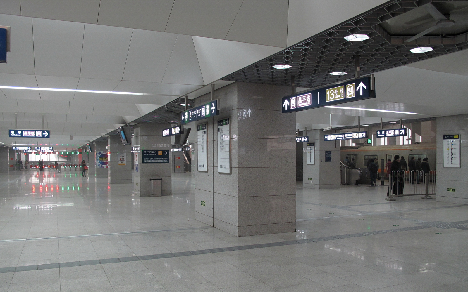 北京地铁西二旗站内通道